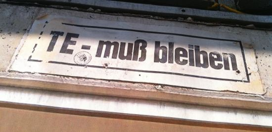 Bei Bauarbeiten an einem Gebäude in Lengerich wiederentdeckter Protestaufkleber gegen die Auflösung des Kreises Tecklenburg im Jahr 1975.